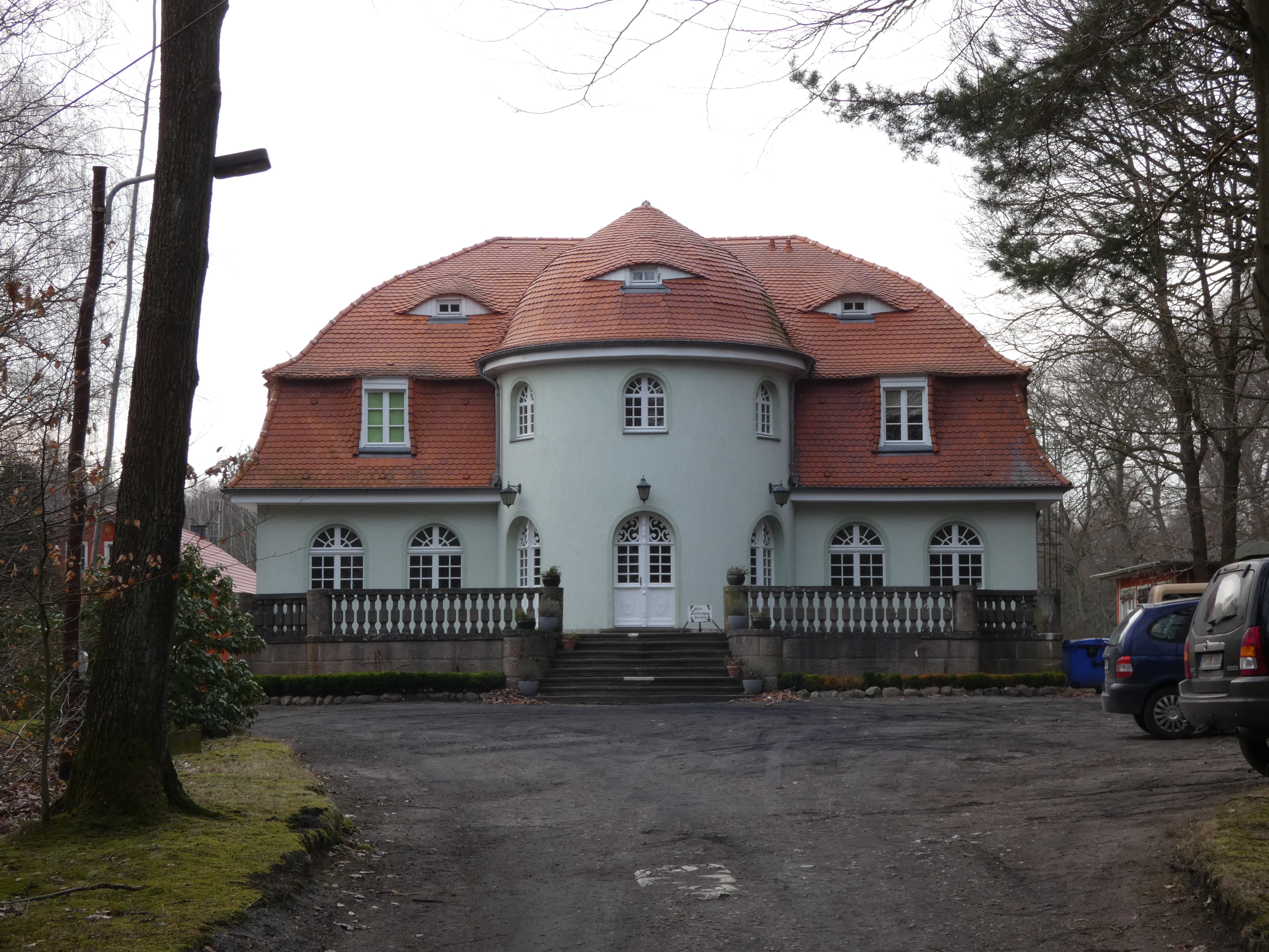 Jagdschloss Medewitzerhütten